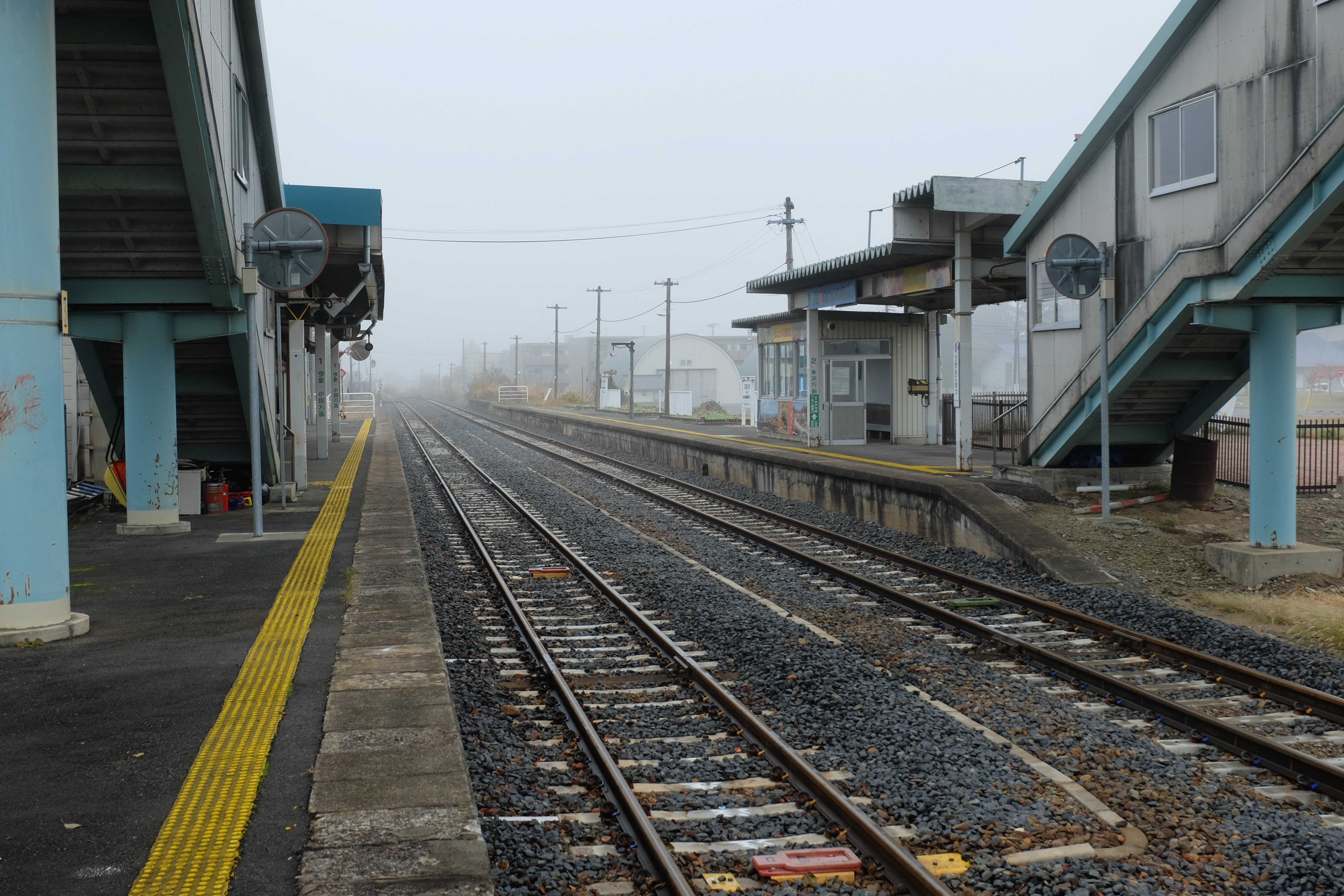 羽前小松駅 駅構内の様子